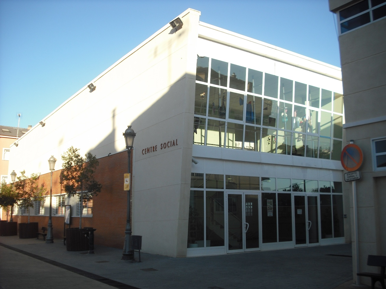 Centro social de Emperador